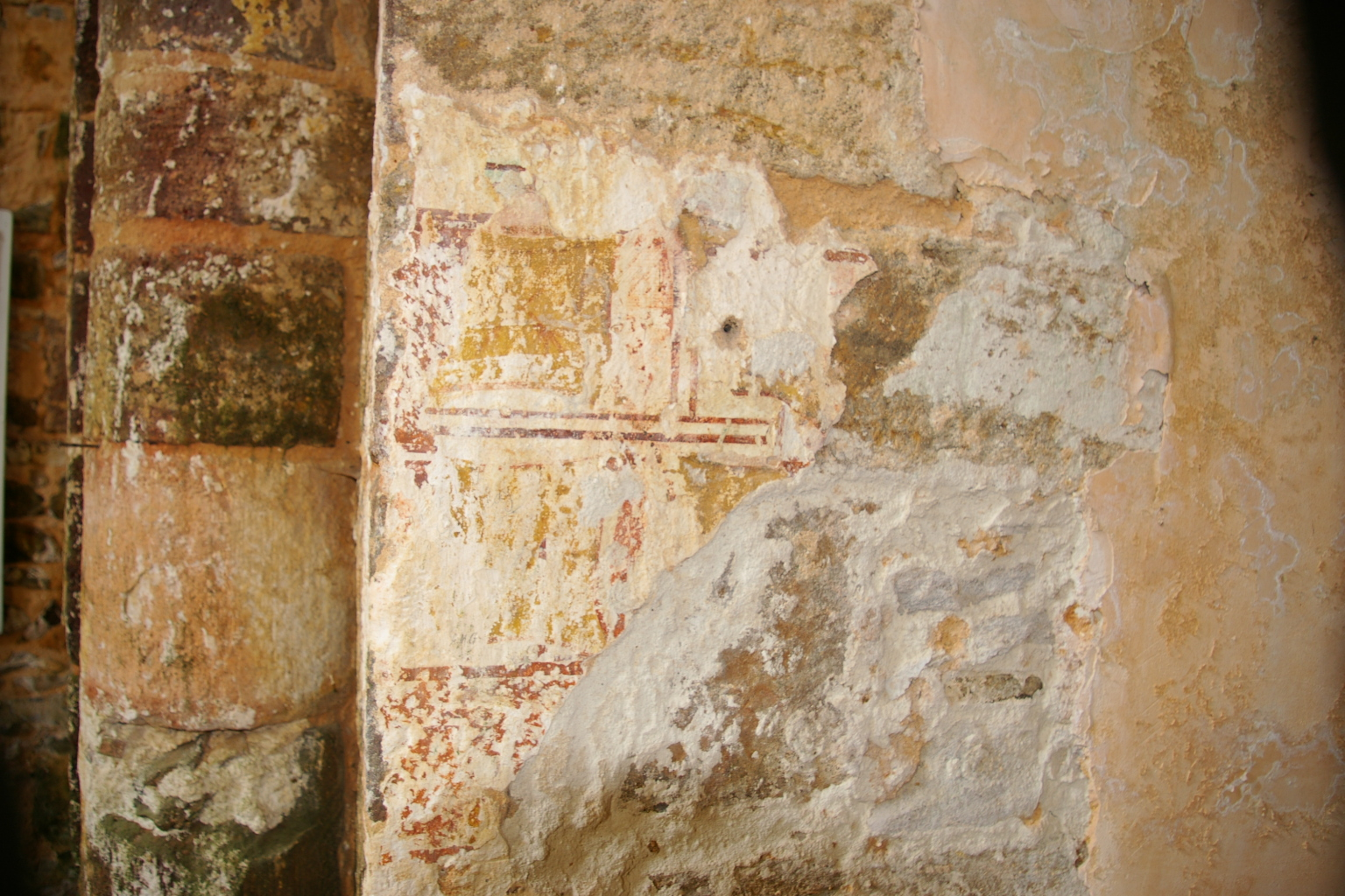 Peintures murales, chapelle d'Etival-en-Charnie (Sarthe)